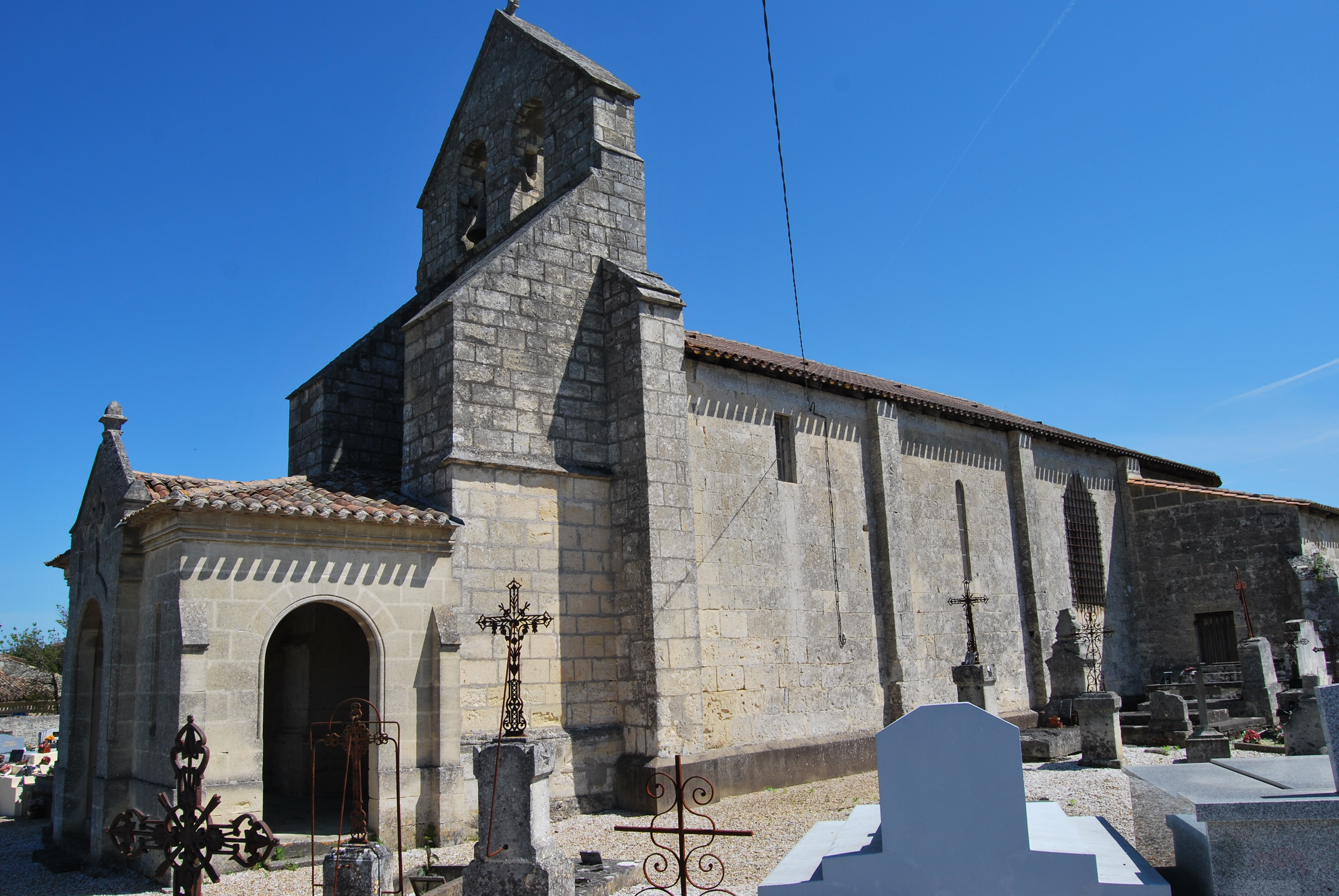 Daignac